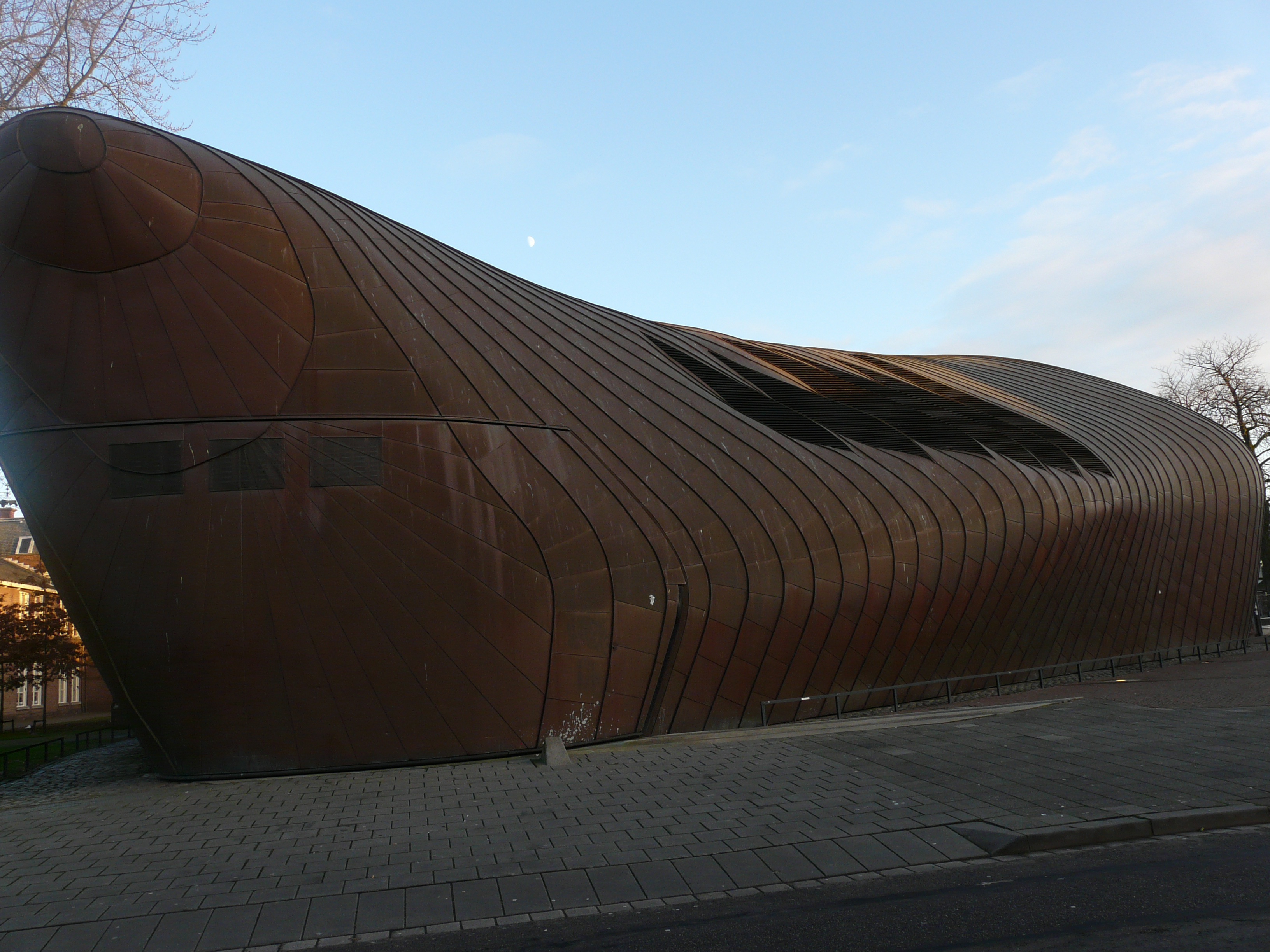 Zicht op een deel van het Poppodium Mezz gevestigd in de Keizerstraat 101 in Breda. Gelegen nabij het centrum van Breda